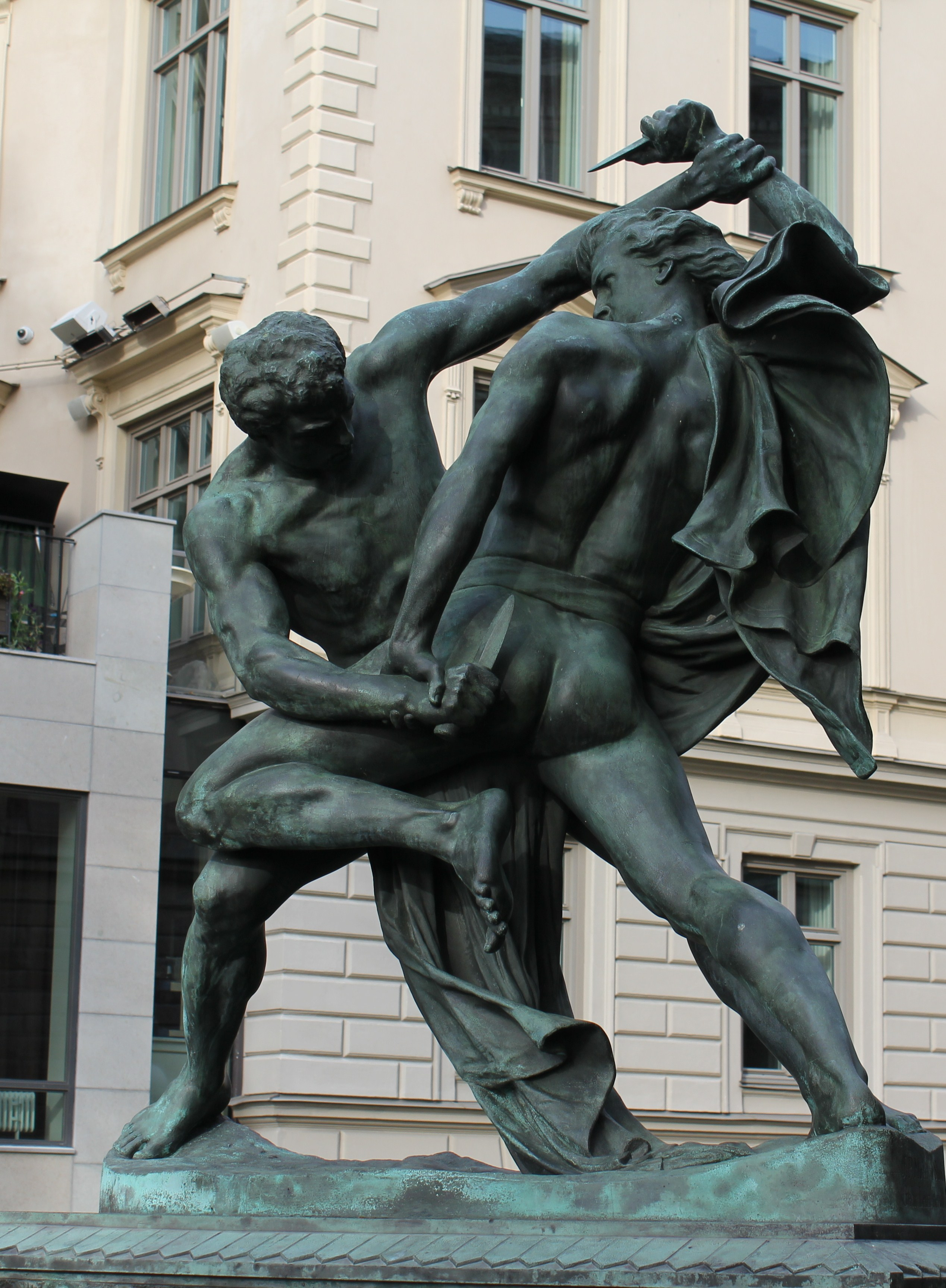 Bältesspännarna av Johan Peter Molin, 1867 i Museiparken på Blasieholmen.